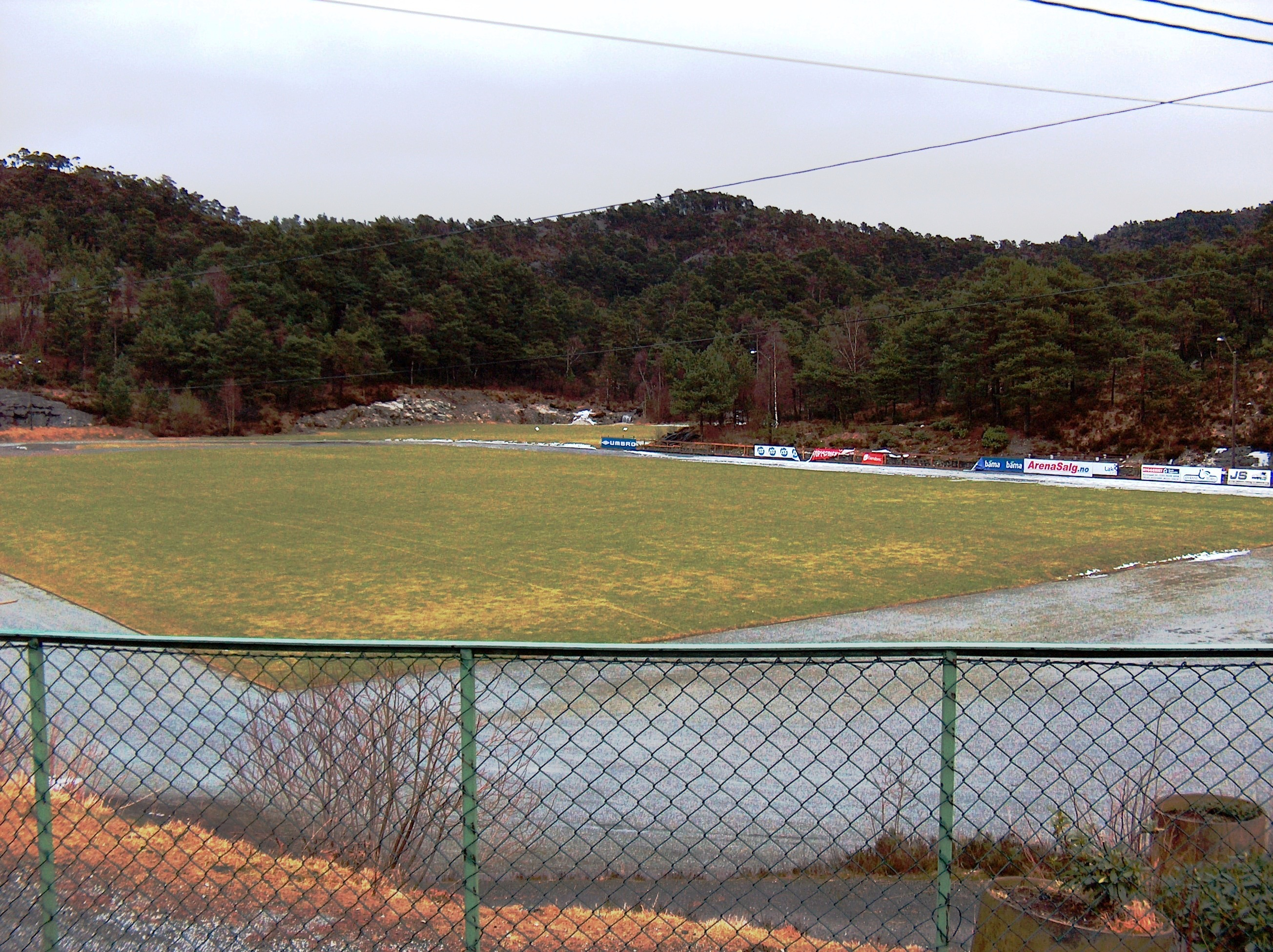 Arna stadion